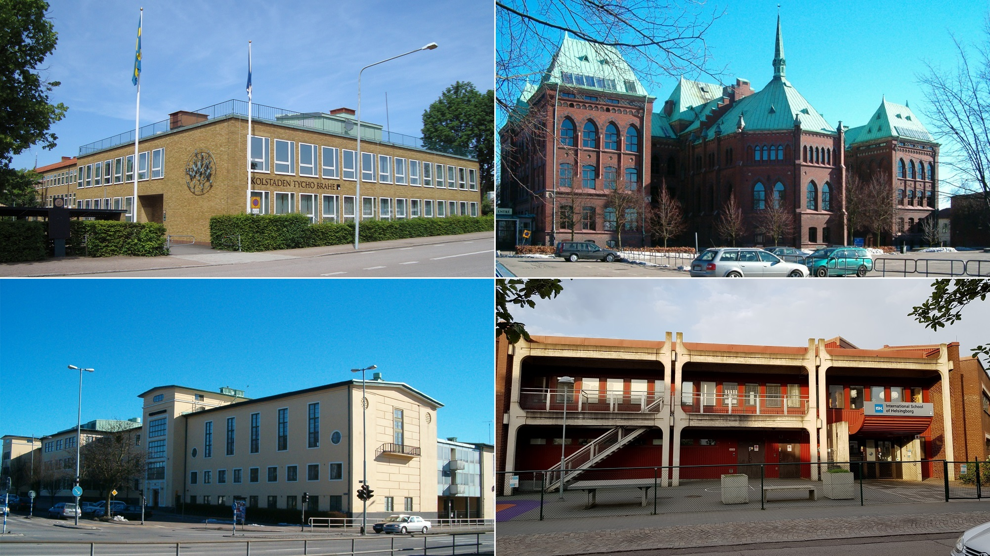 Det tidigare skolområdet Skolstaden i Helsingborg.